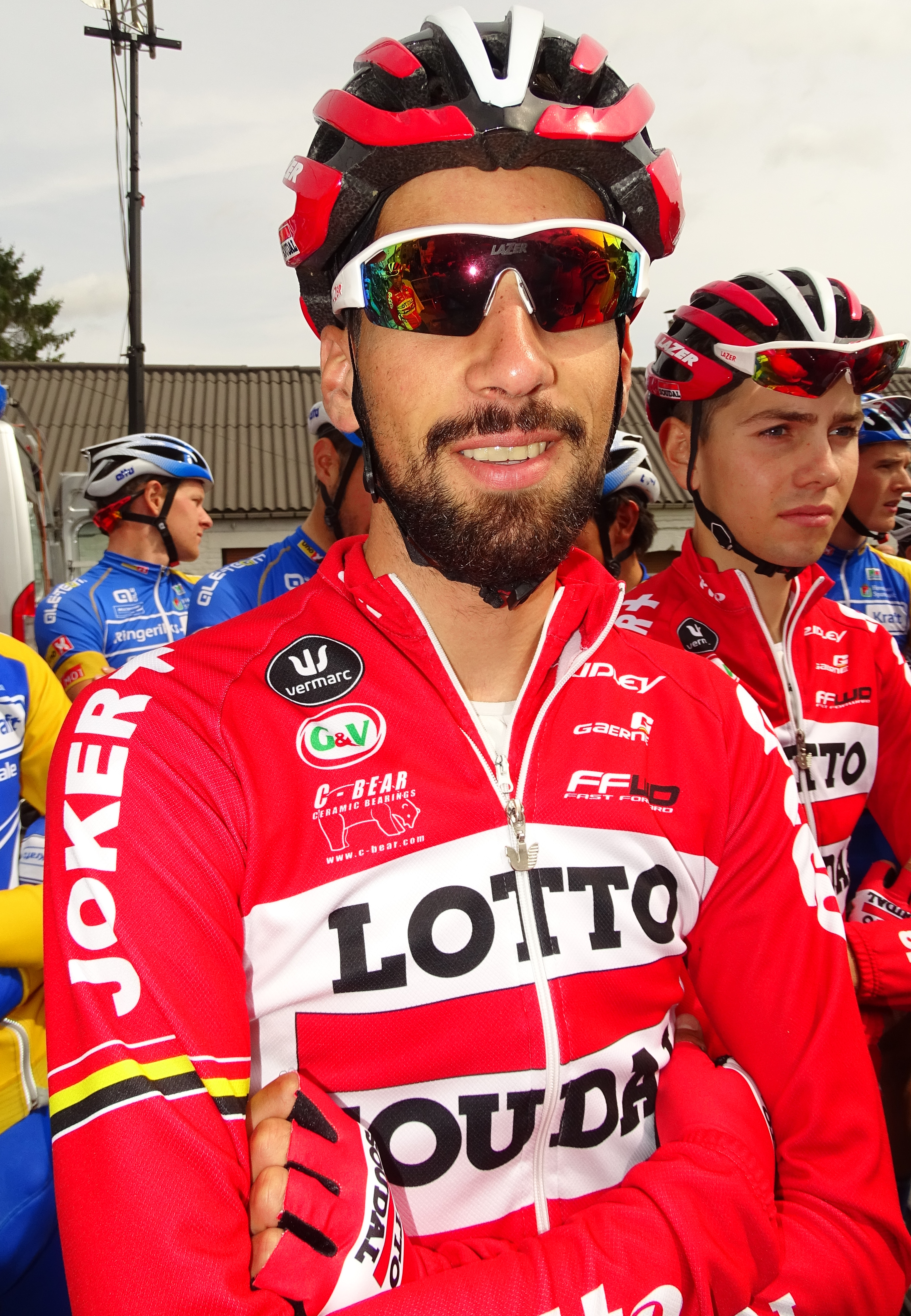 Reportage réalisé le mardi 25 août à l'occasion du départ et de l'arrivée du Grand Prix des Marbriers 2015 à Bellignies, Nord-Pas-de-Calais, France.